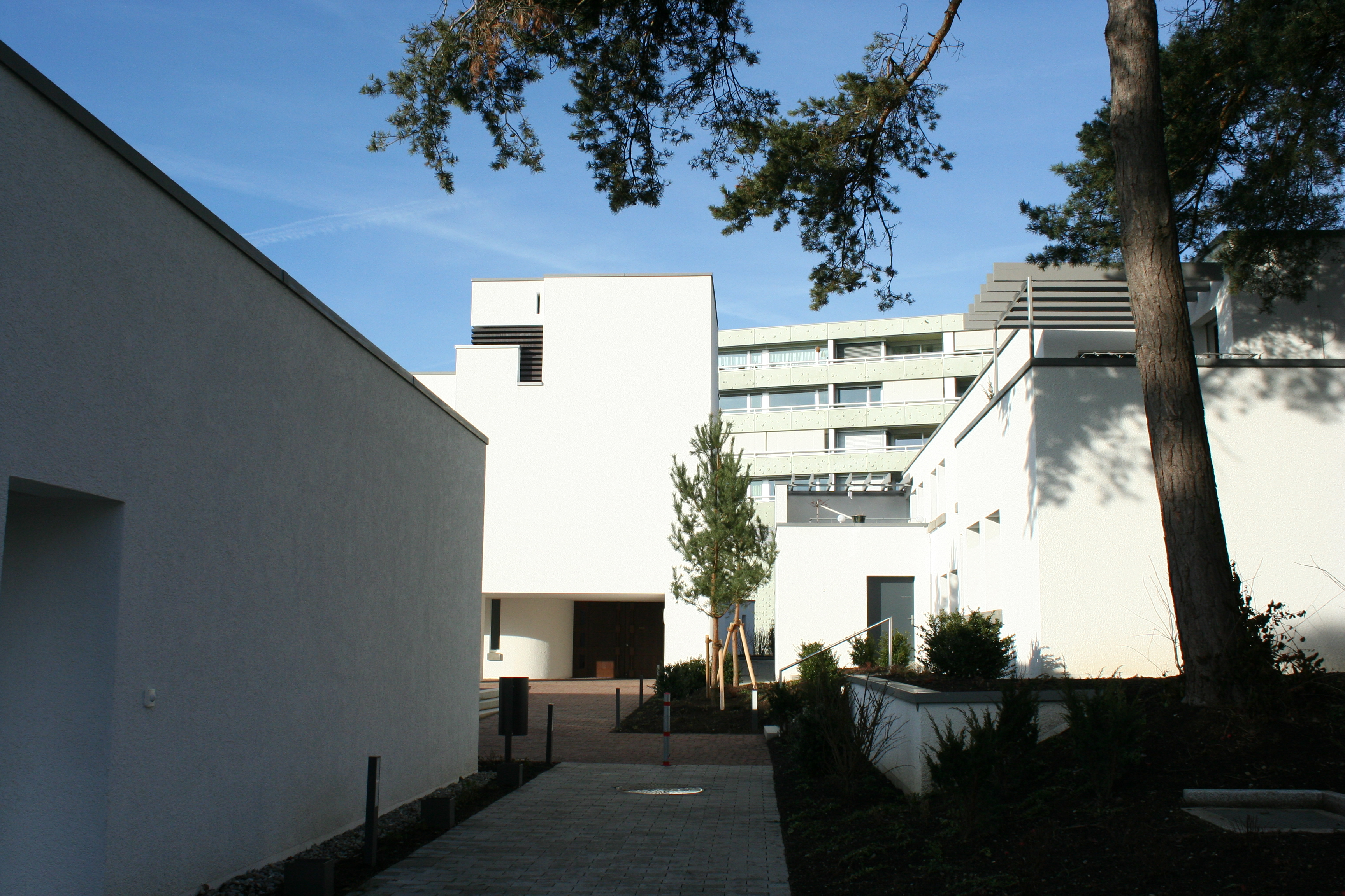 Römisch-katholische Pfarrkirche St. Ulrich Winterthur-Rosenberg, Ansicht von der Seuzacherstrasse